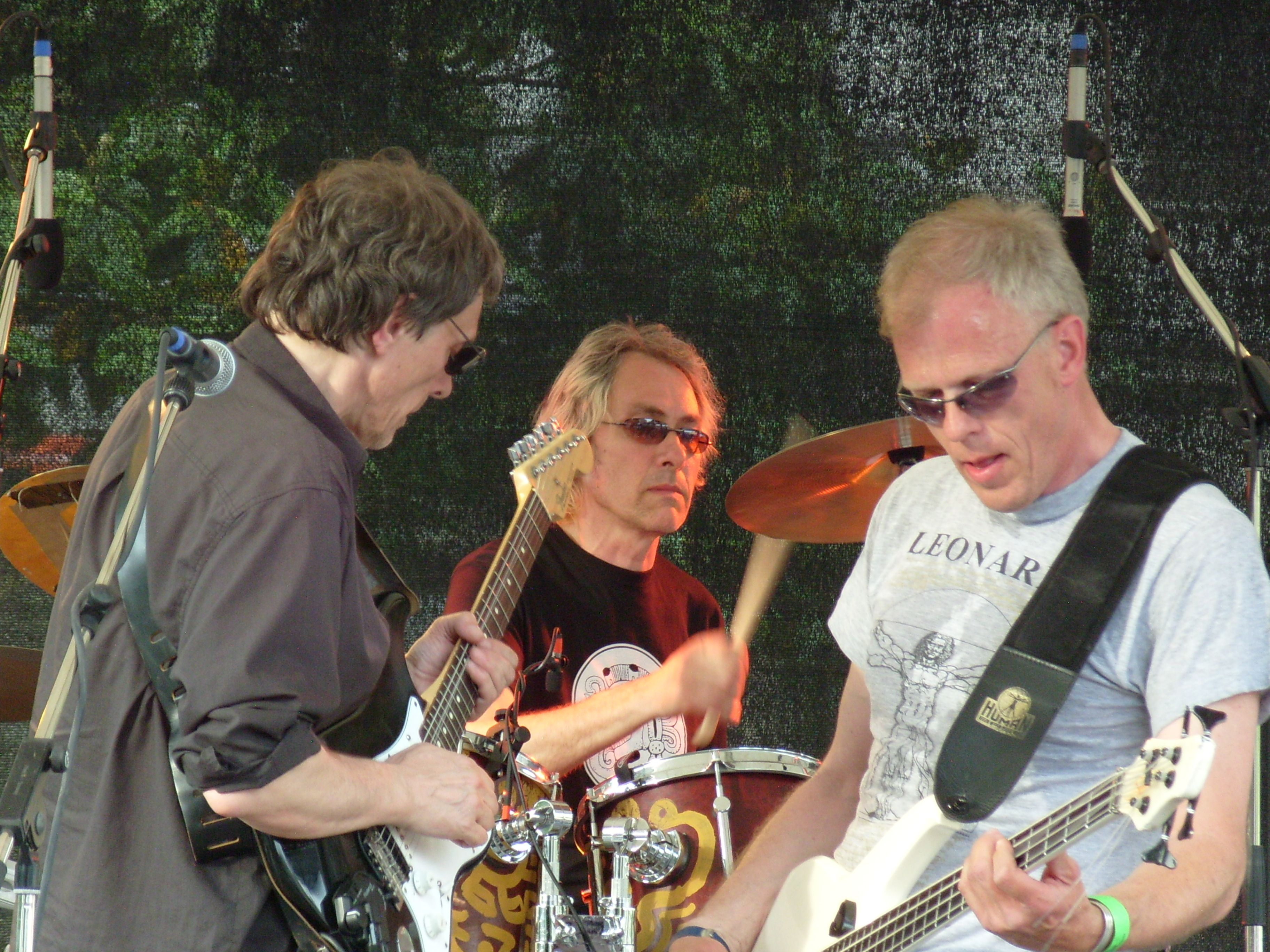 Kraan auf dem Kraansplatzfest Wiesbaden, 2008-05-25